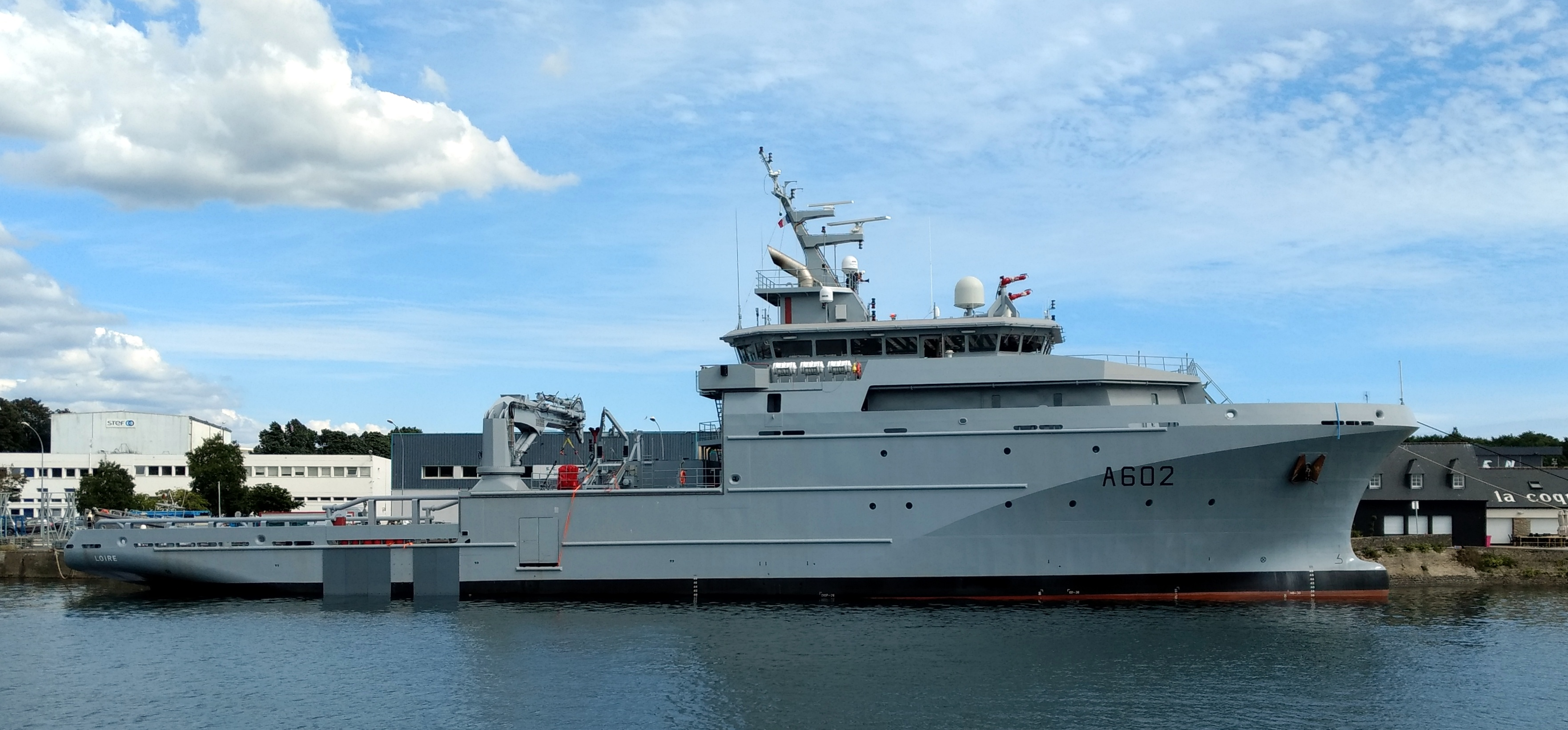 BSAH "Loire" en voie de finalisation aux chantiers Piriou de Concarneau